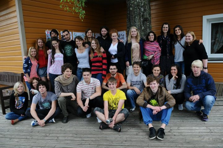 Участие на Сдружение „Форум Наука” в естонски медиен проект по програма “Младежта в действие“, Нелиярве, Естония, в периода 30 юни - 7 юли 2012.